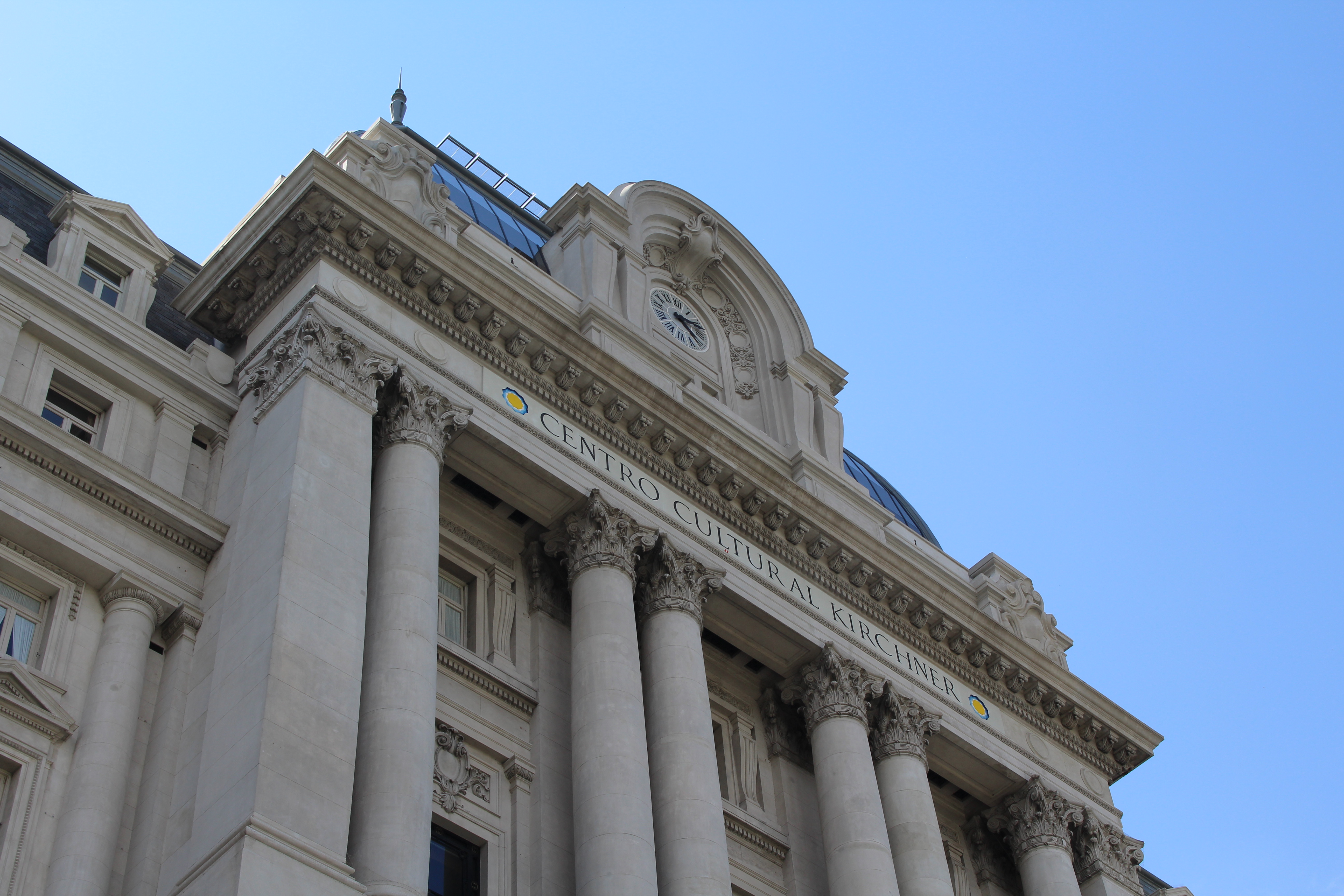 Fachada del Centro Cultural Nestor Kirchner, ex Correo Argentino, ubicado en la Ciudad Autonoma de Buenos Aires, Argentina.